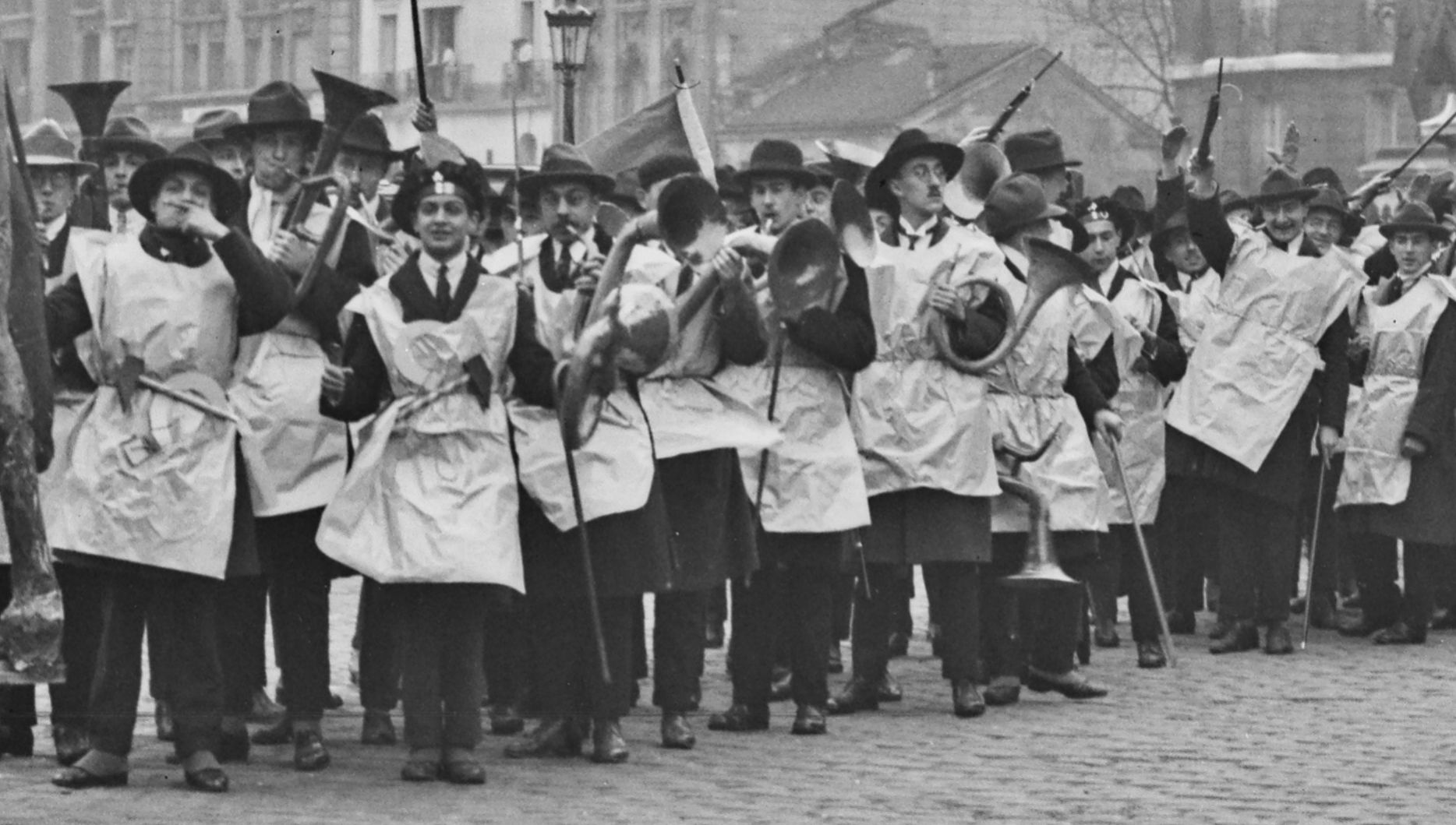 Place du Panthéon à Paris, le jeudi de la Mi-Carême 11 mars 1926, le cortège des étudiants parisiens s'apprêtent à partir défiler. Derrière un char portant un immense cheval avec son cavalier en carton-pâte, on voit ces joyeux bigophonistes costumés. Parmi eux il y a un étudiant qui porte la faluche.